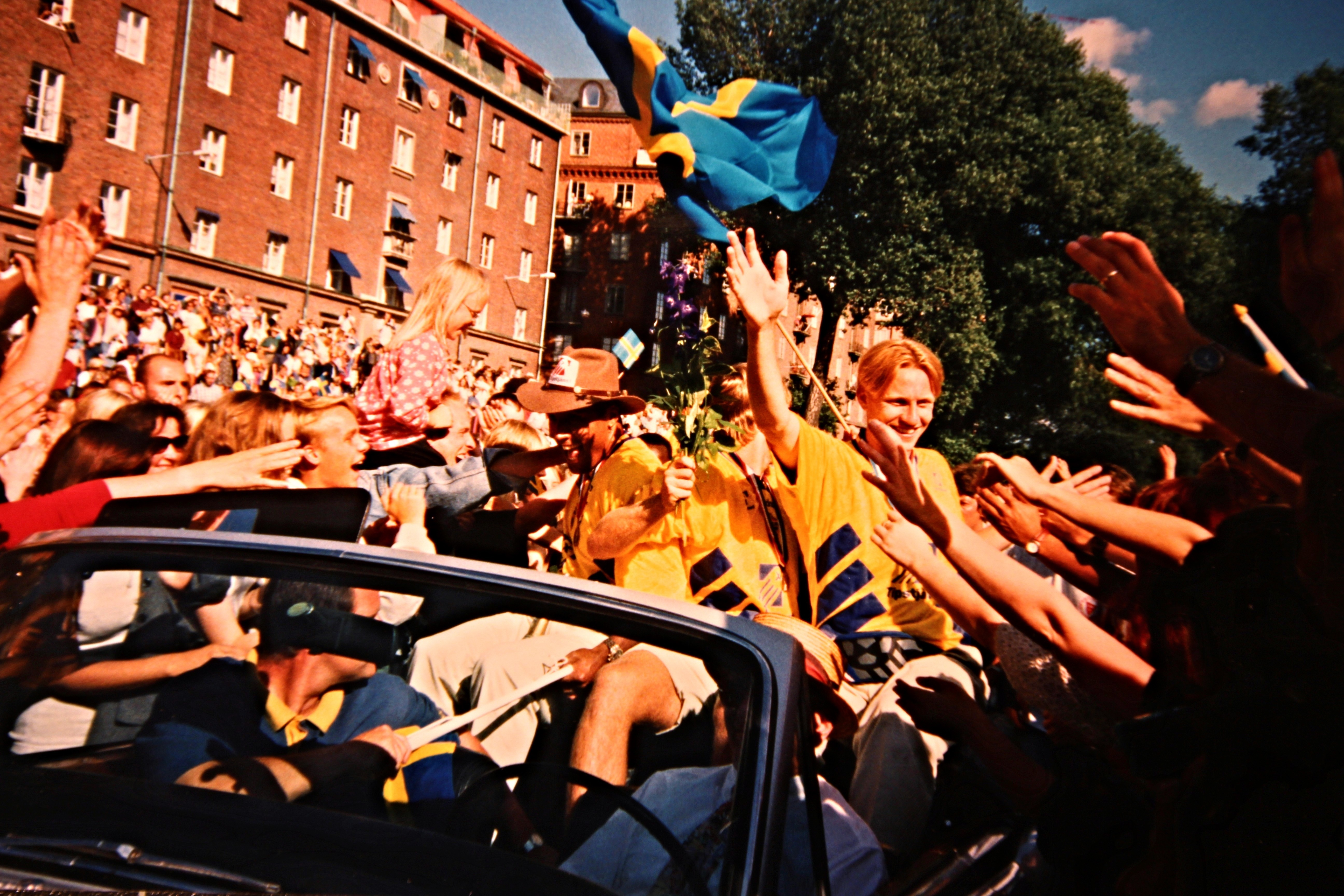 Svenska herrlandslaget i fotboll, hemkomst efter FIFA VM 1994, firande den 18 juli 1994 i Stockholm, Norr Mälarstrand